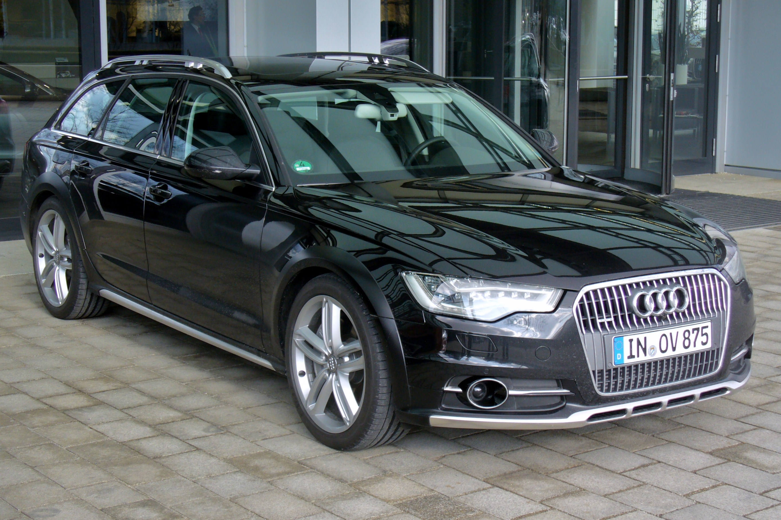 Audi A6 C7 allroad quattro